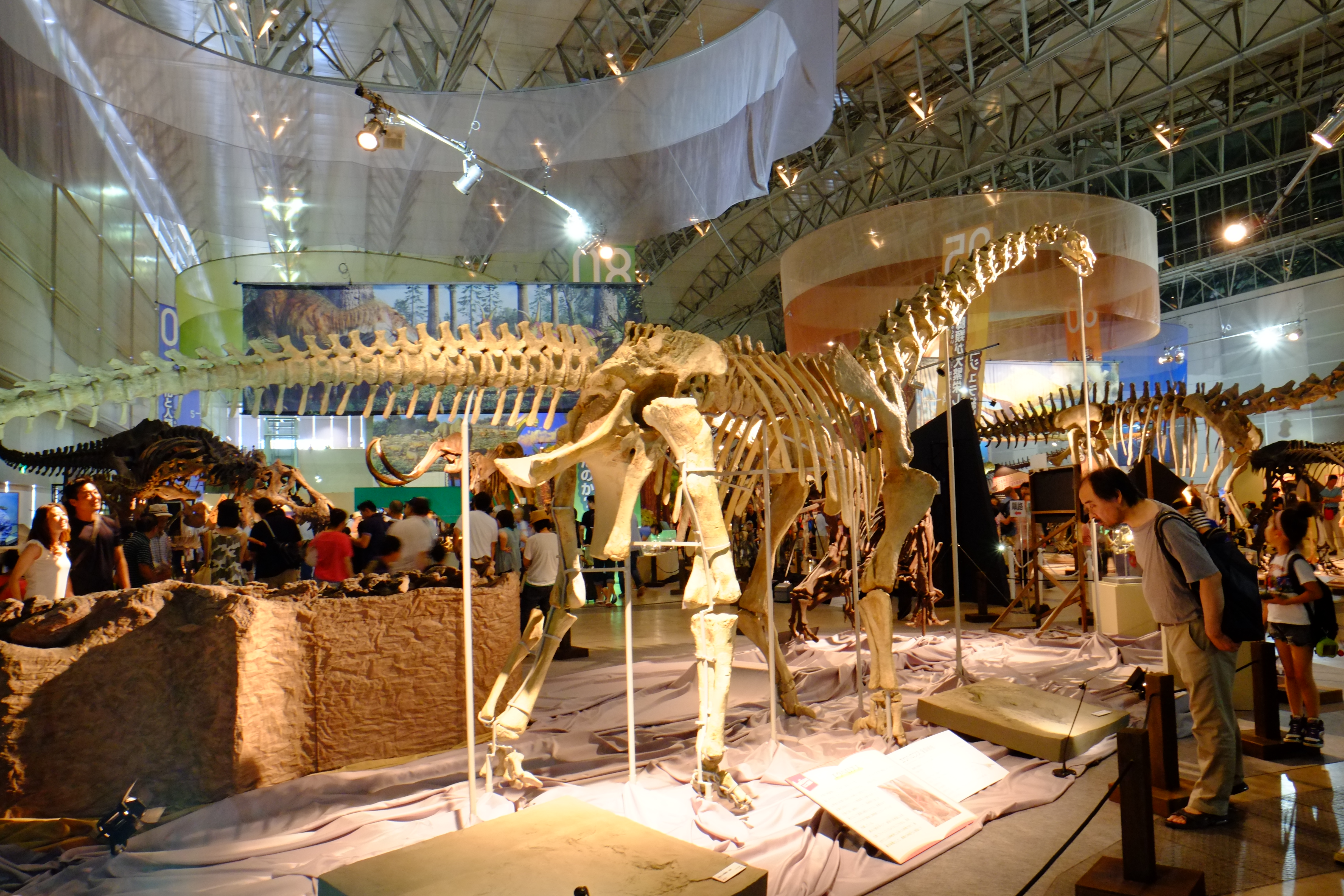 名前は沼地向きの足って意味。 大きな個体は15メートルほどあったとか。